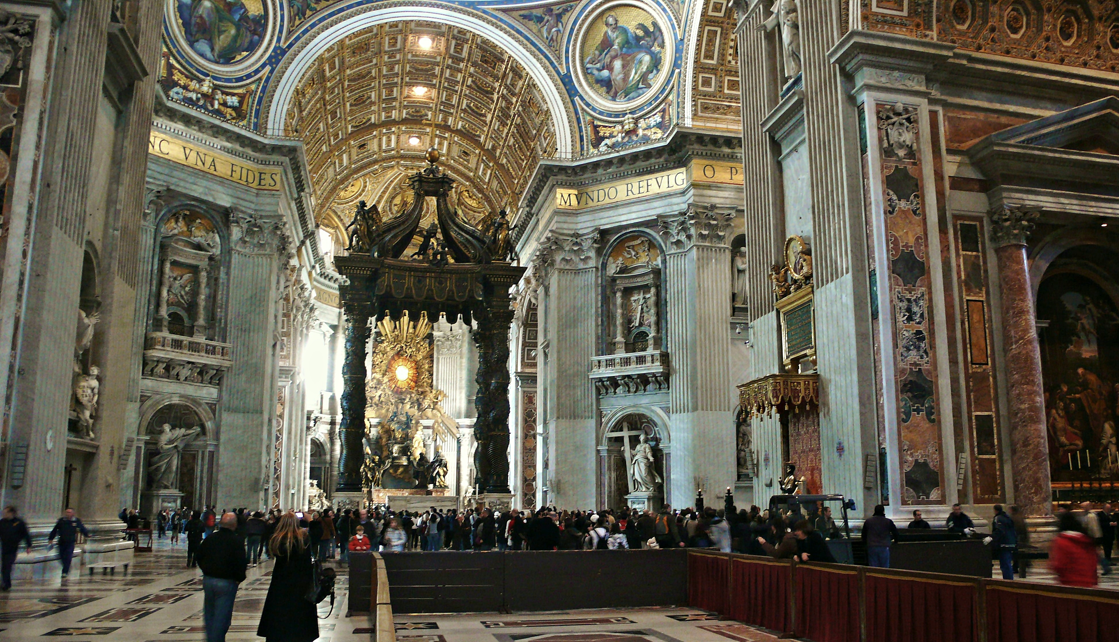 roma